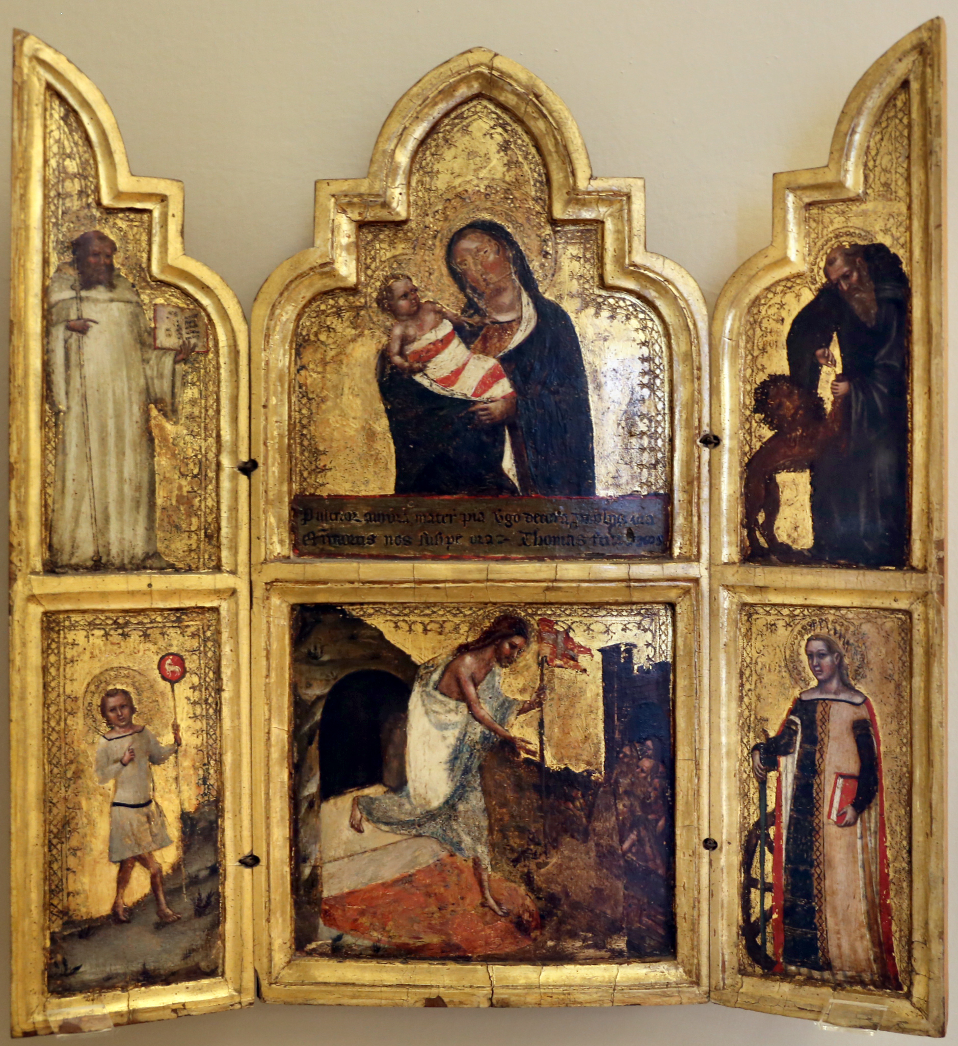 Palazzo dei Musei (Modena) This is a photo of a monument which is part of cultural heritage of Italy.